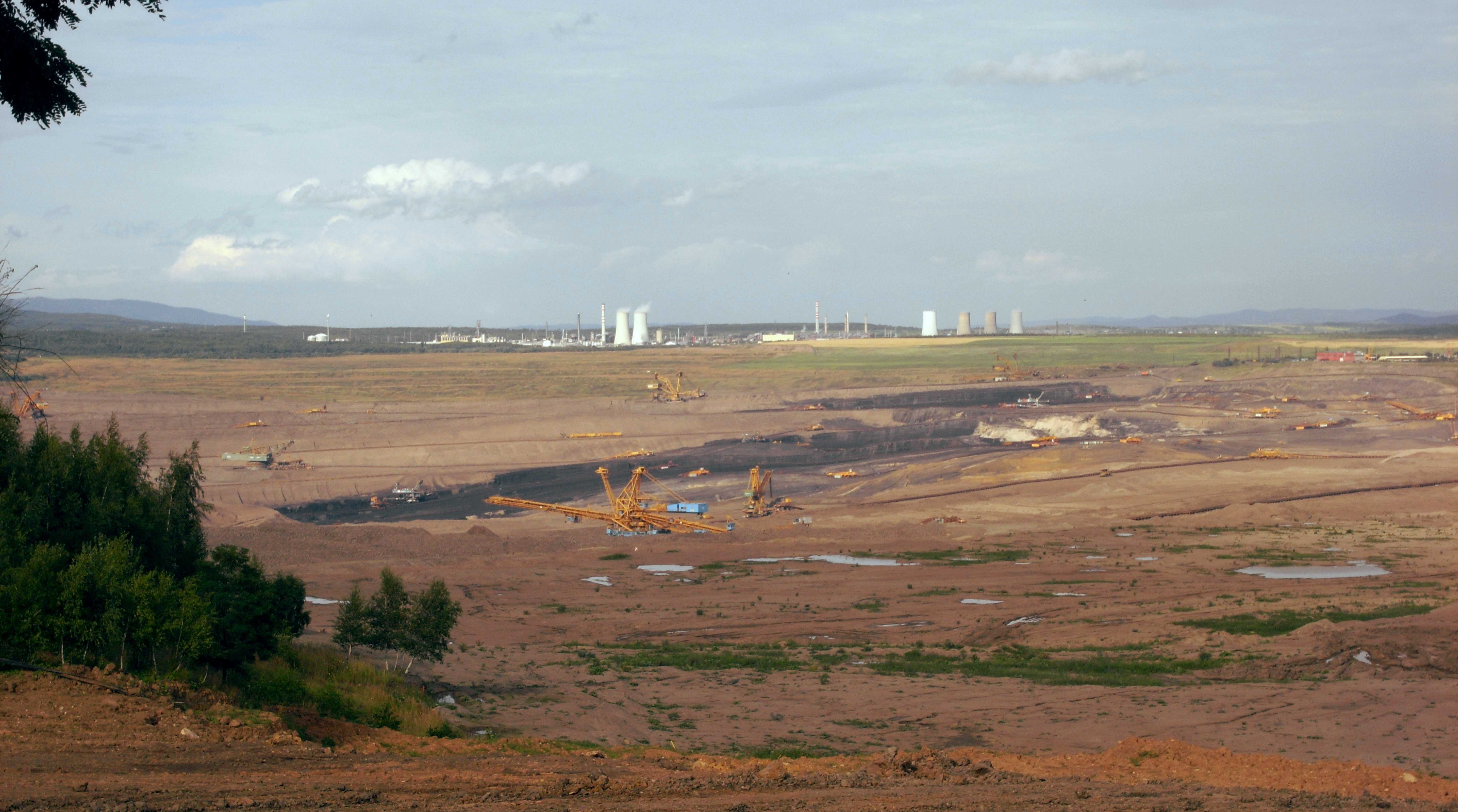 Braunkohletagebau im Nordböhmischen Becken unterhalb von Schloss Jezeří